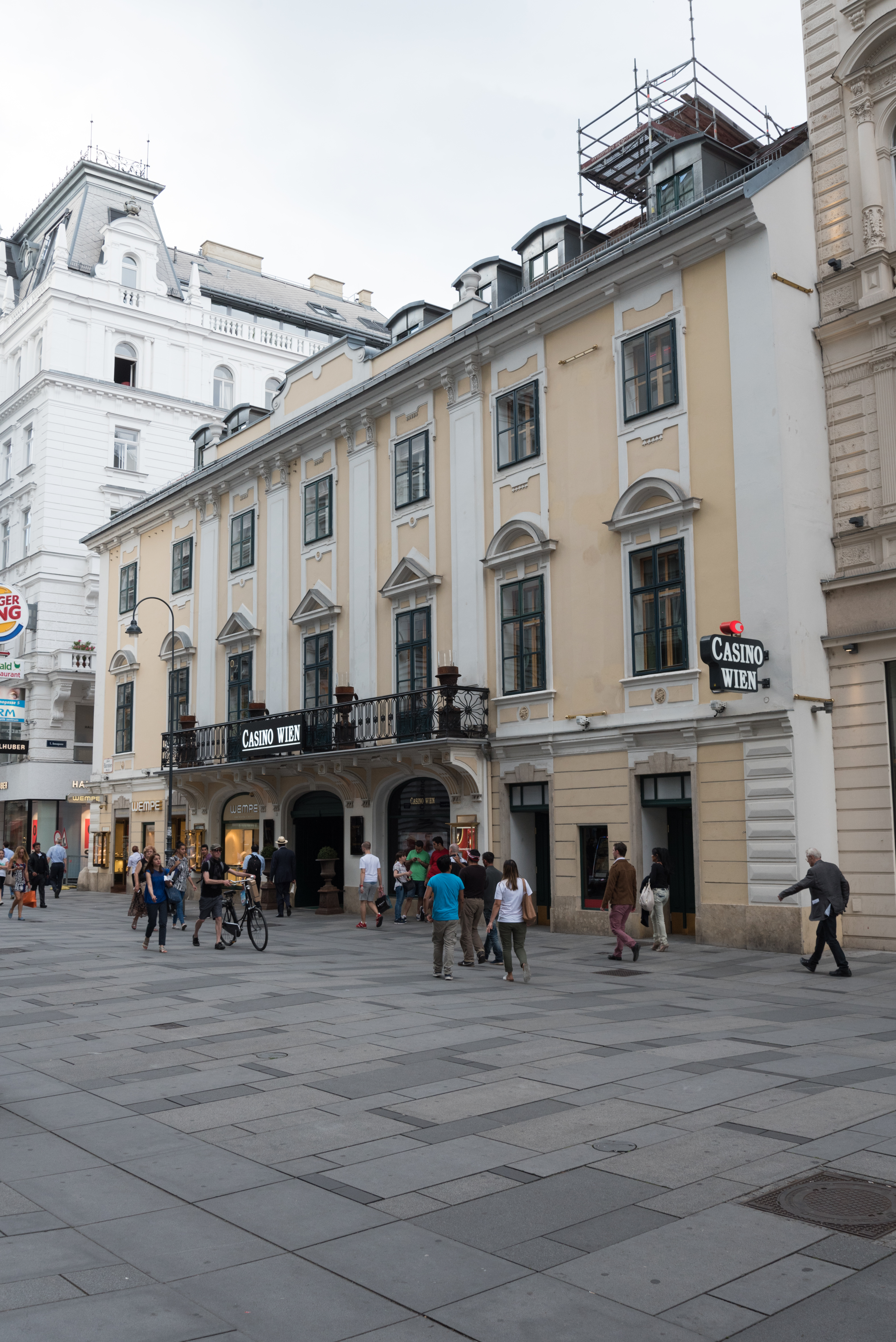 Wien, Kärtner Straße 41